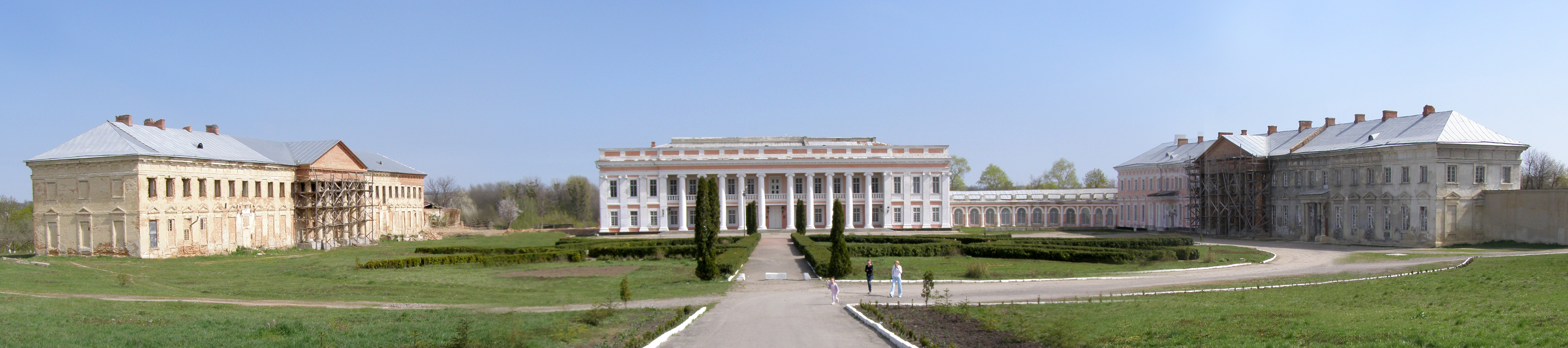 Pałac Potockich w Tulczynie na Podolu.